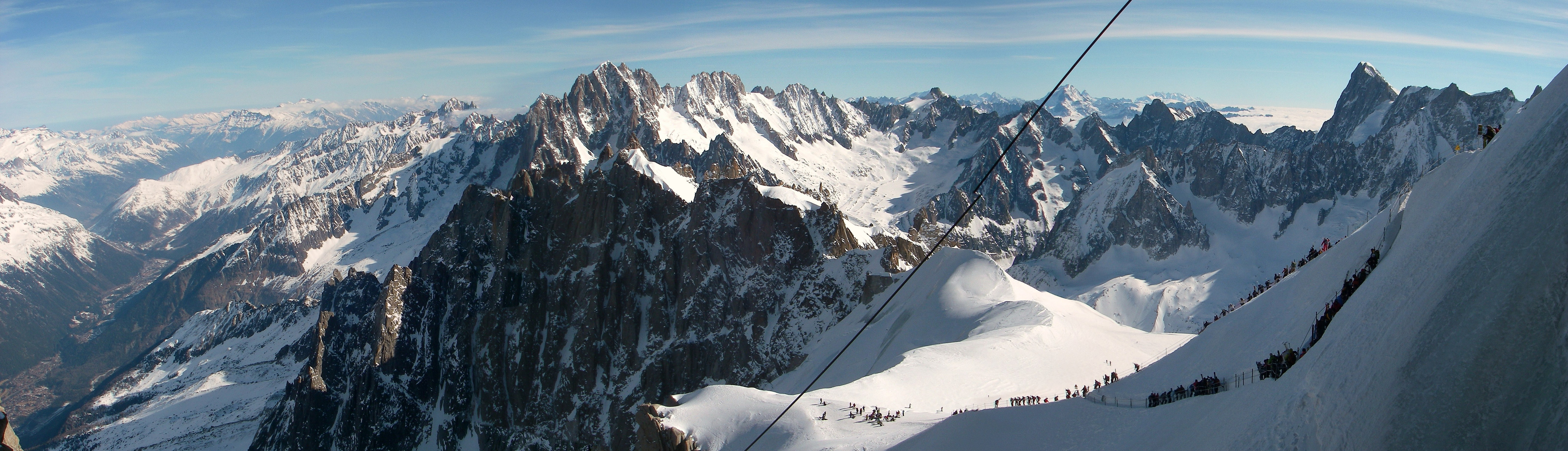 Départ de la Vallée Blanche